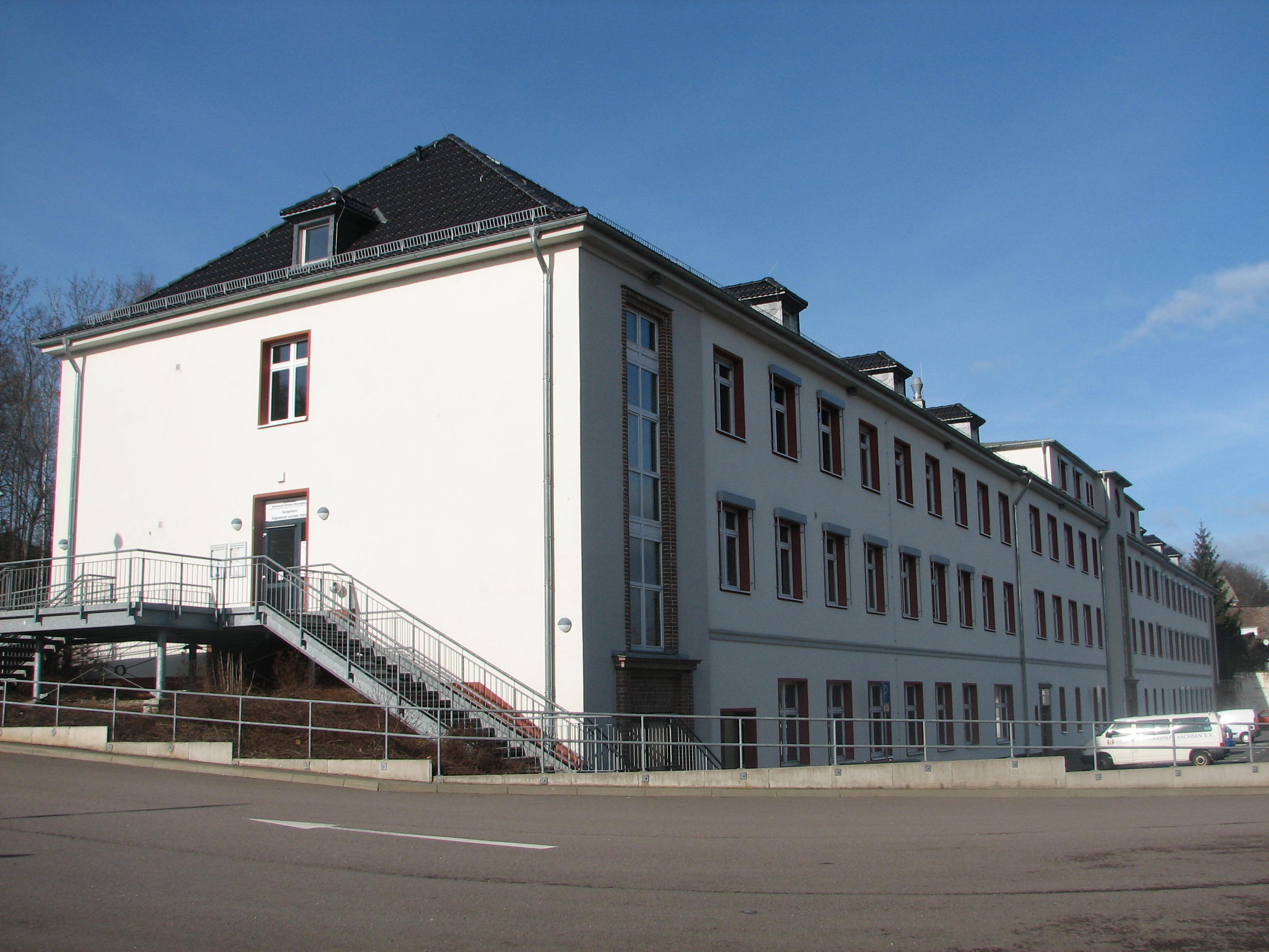 Das Verwaltungsgebäude Hüttenstraße 14 in Freital-Döhlen. Es ist die Hinteransicht dargestellt. Die Zufahrtsstraße im Vordergrund bindet das Gebäude und den gegenüberliegenden Toom Baumarkt an die Hüttenstraße an. Von dort wurde das Bild aufgenommen. Zum Zeitpunkt der Aufnahme befindet sich in dem Gebäude die Außenstelle des Landratsamtes des Landkreises Sächsische Schweiz-Osterzgebirge.